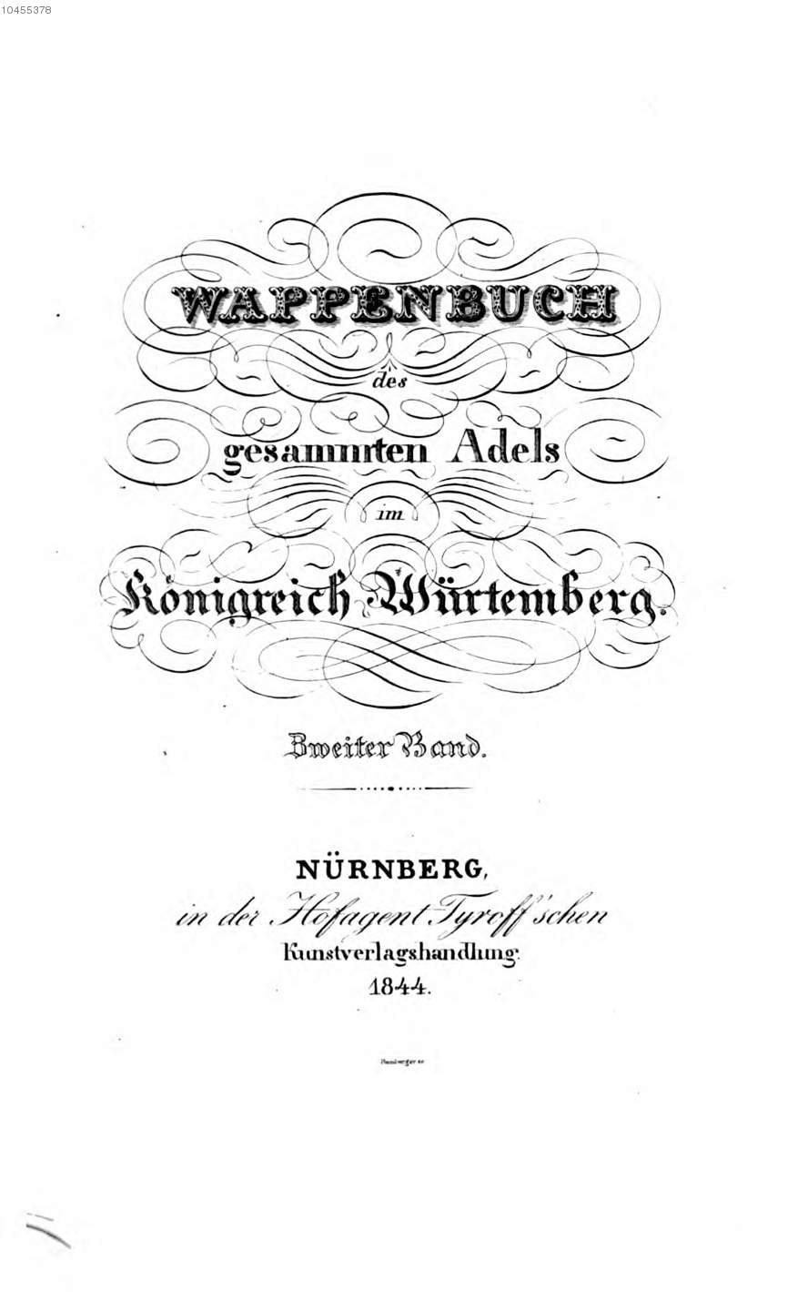 Titelseite